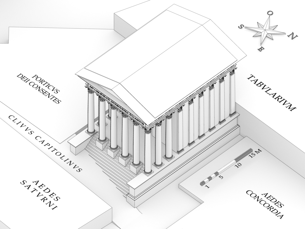 Restitution du temple de Vespasien D'après : - De Angeli, Templum Divi Vespasiani, 1992 - Filippo Coarelli, Rome and environs : an archaeological guide, 2007 - Stamper, The architecture of roman temples, 2005 Perspective isométrique Voir aussi